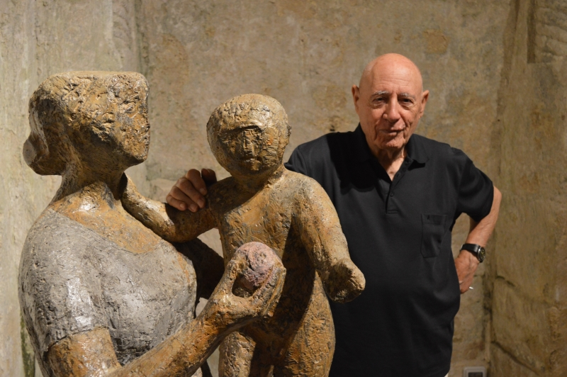 Il maestro Pietro Guida a Matera